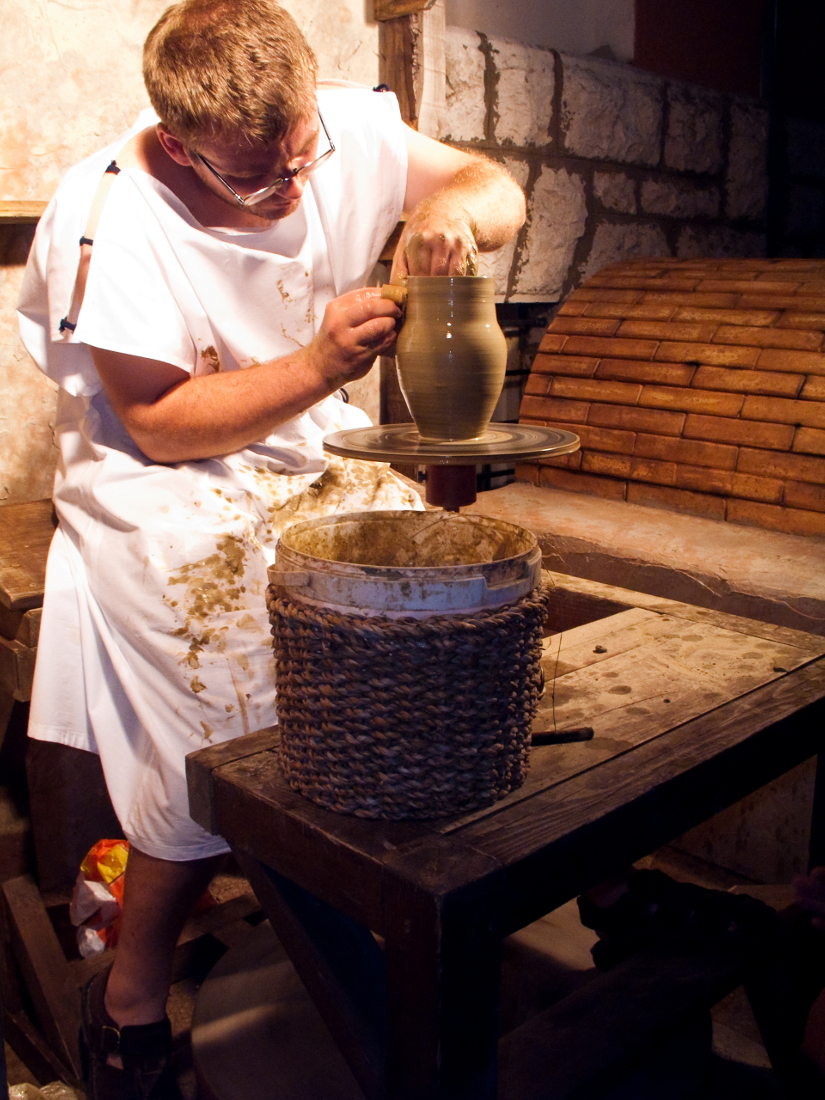 Manifestacija Dani Ad Turresa u Crikvenici